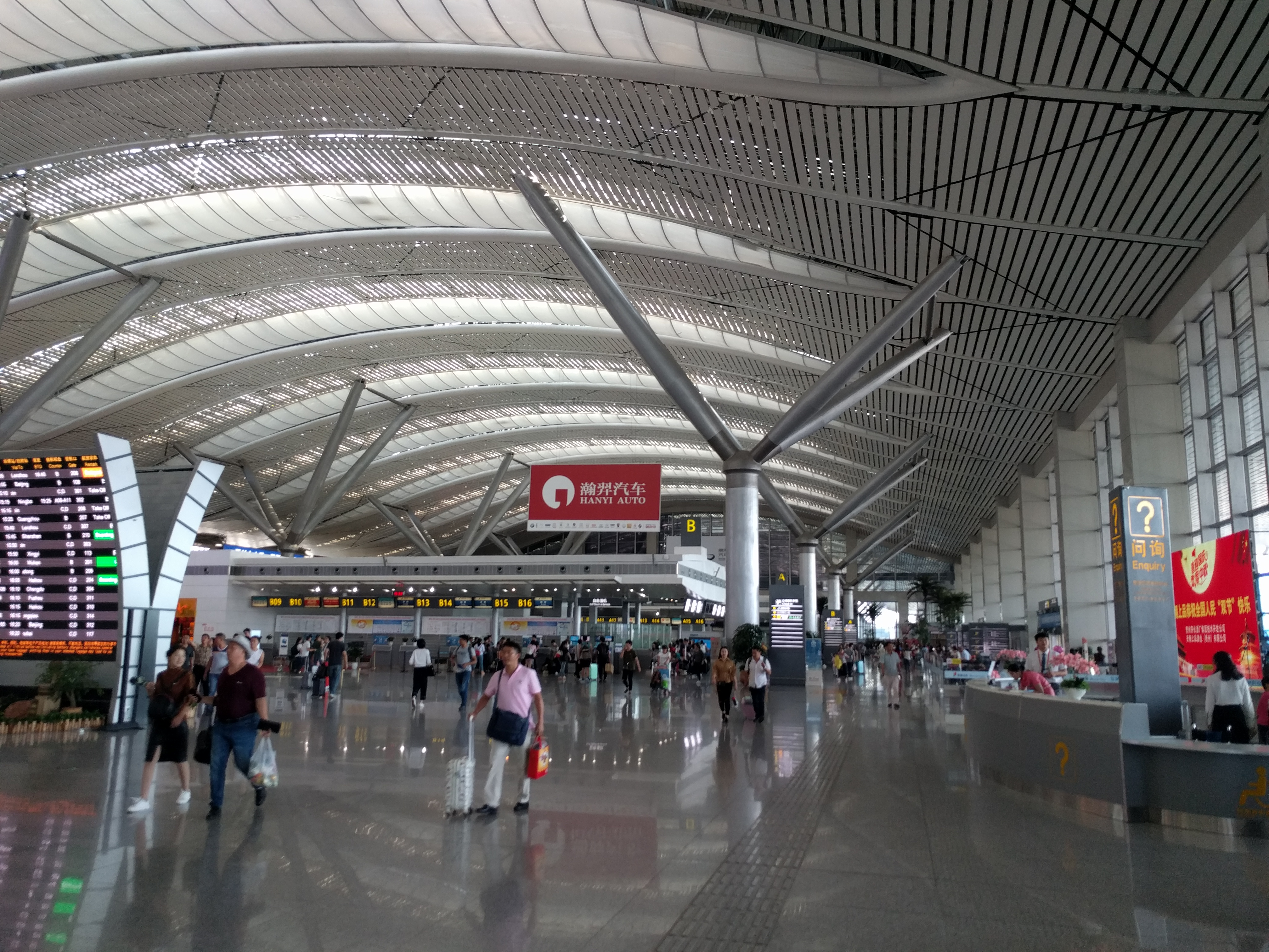 贵阳龙洞堡机场出发大厅